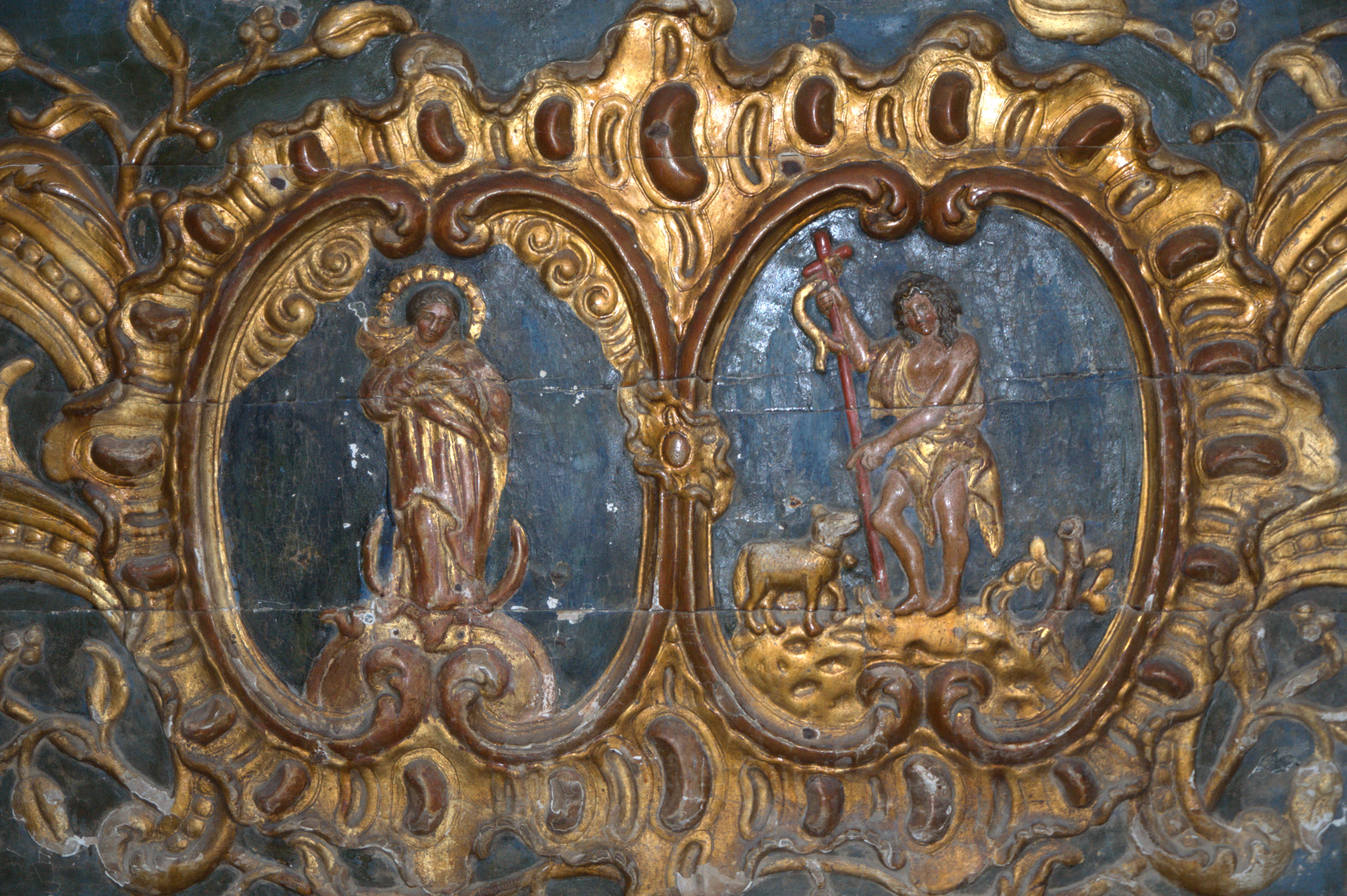 Détail de l’autel de l’église de Mascaraàs